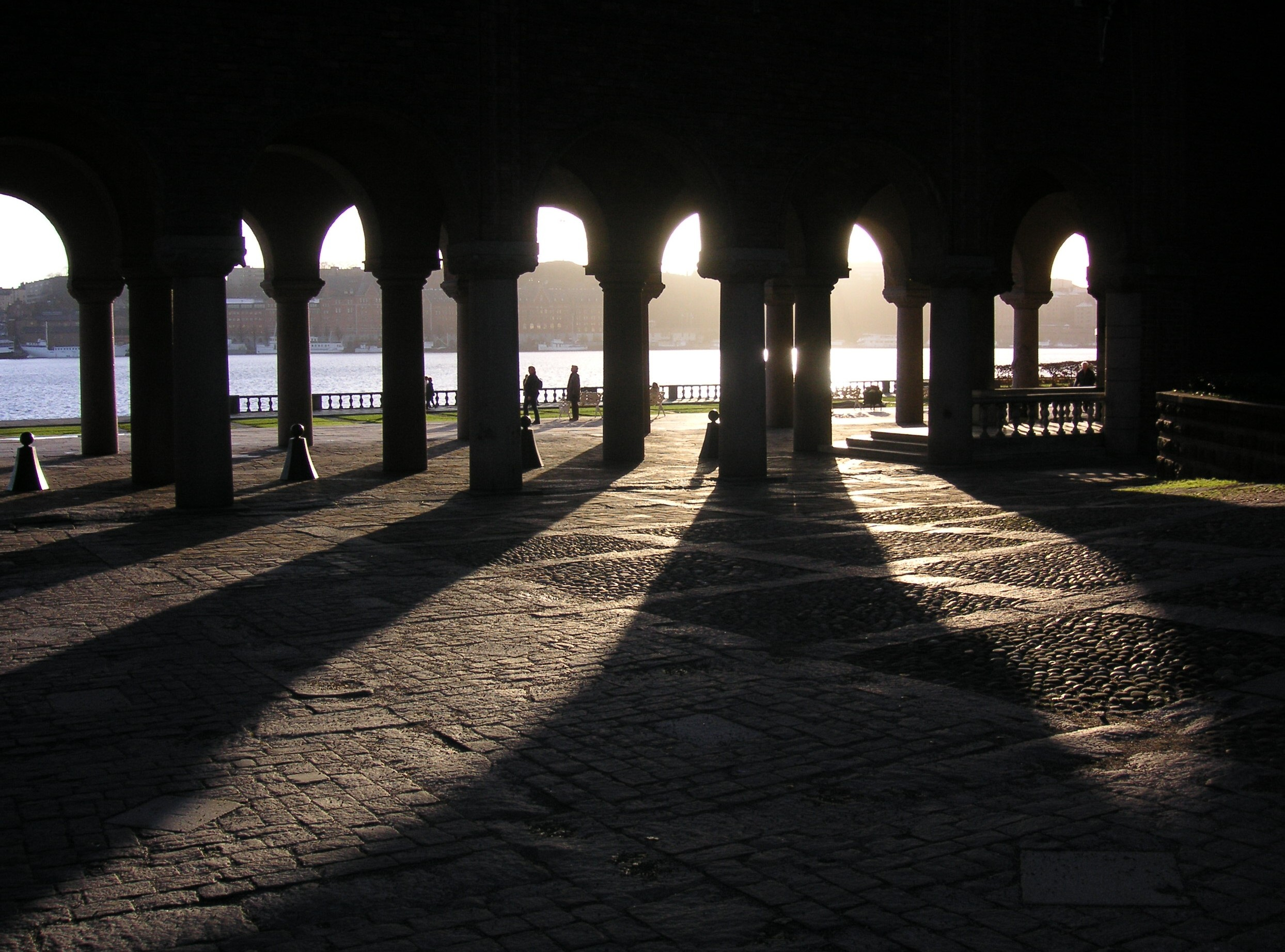 Stockholms Stadshus mit Blick zum Riddarfjärden, Torbögen im Innenhof